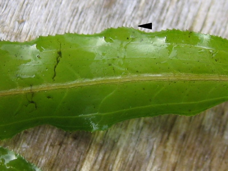 Krauses Laichkraut, Detail des gezackten Blattes Potamogeton crispus